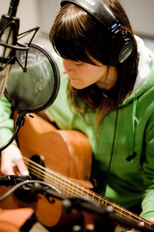 Keren Ann